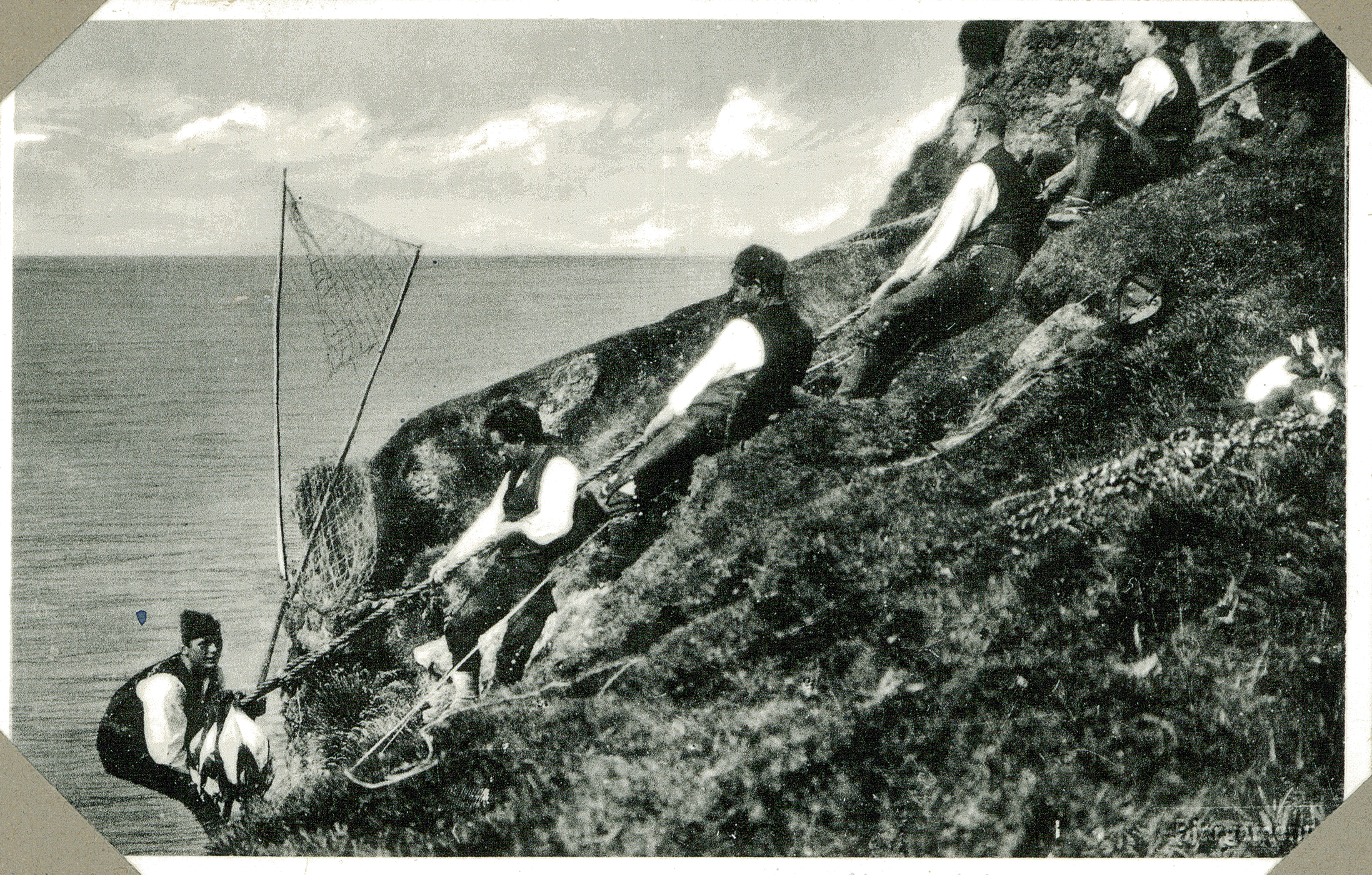 Fotografiet sidder i et fotoalbum lavet af Sophie Petersen med titlen "Færøerne". Fotoalbummet har nummer F5, og indgår i Det Kongelige Danske Geografiske Selskabs arkiv som af resultat af samarbejde mellem Etnografisk Samling og selskabet siden 2010 har været opstillet på Nationalmuseet som et selvstændigt arkiv. Arkivet er administreret af Etnografisk Samling. Det Kongelige Danske Geografiske Selskab har eksisteret siden det blev grundlagt 18. november 1876. Dets formål var at medvirke til “så vel at fremme kendskabet til jorden og dens beboere som at udbrede interessen for den geografiske videnskab” I arkivet findes blandt andet breve, dagbøger, regnskaber, kort og foredragsmanuskripter. Derudover indeholder arkivet over 70.000 fotografier.